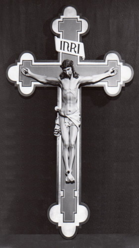 Cristo interamente in legno, realizzato dall'intagliatore Ambrogio Fossati nel 1926, posto sulla cupola del Duomo di Lissone.